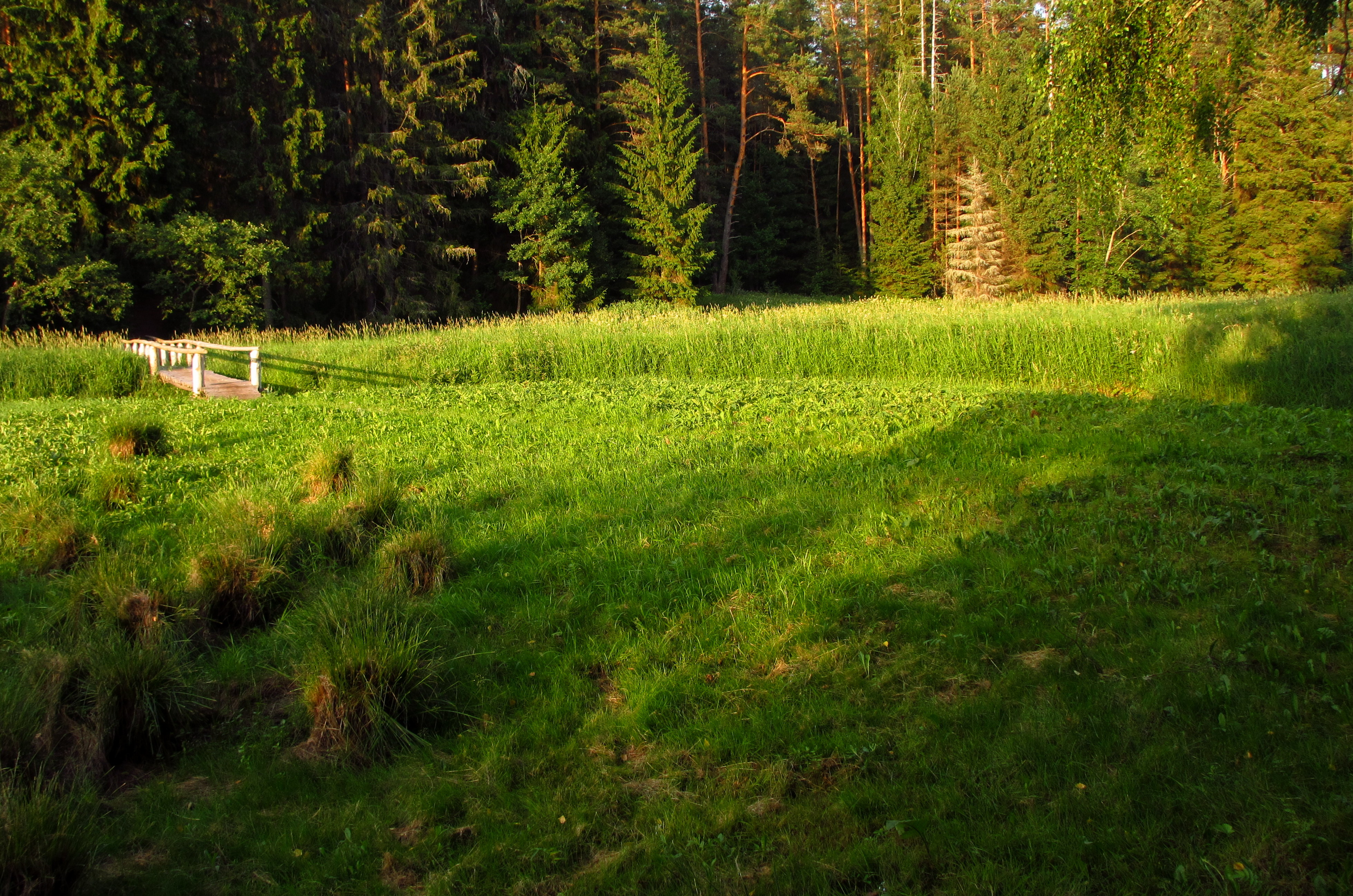 Laguja oja luht Elva-Vitipalu MKA-l